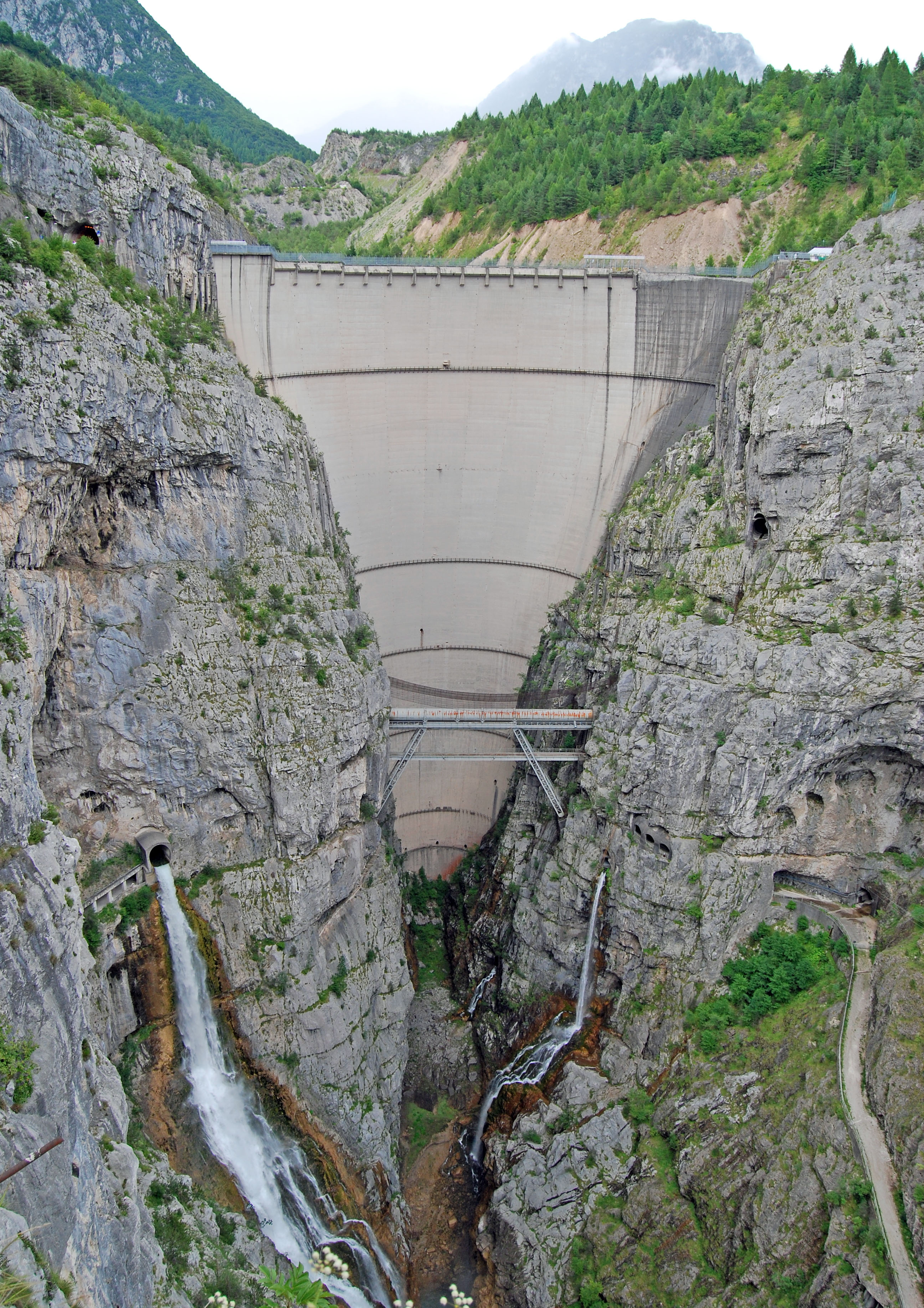 Diga del Vajont vista dal belvedere sulla S.R 251